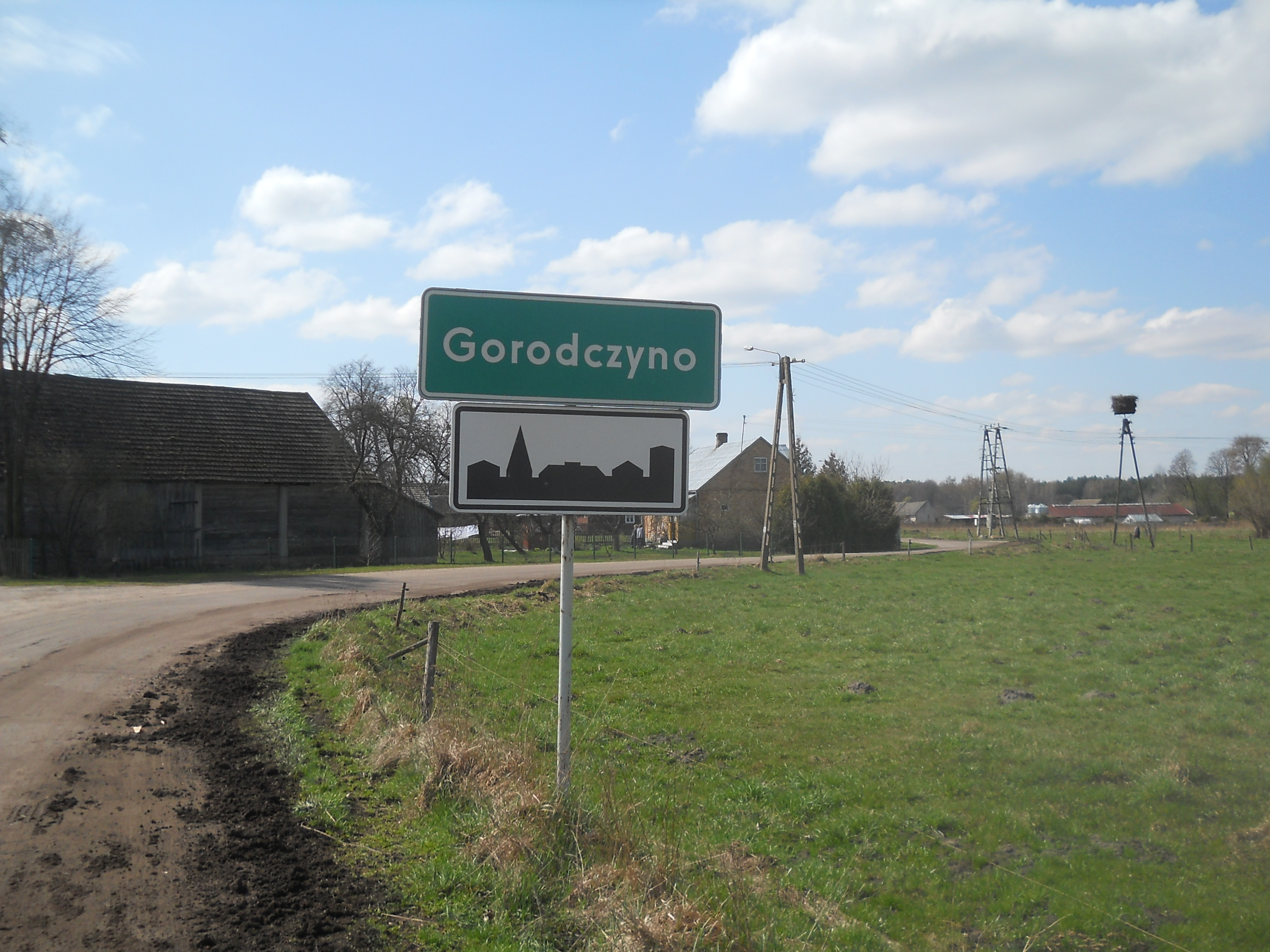 Gorodczyno